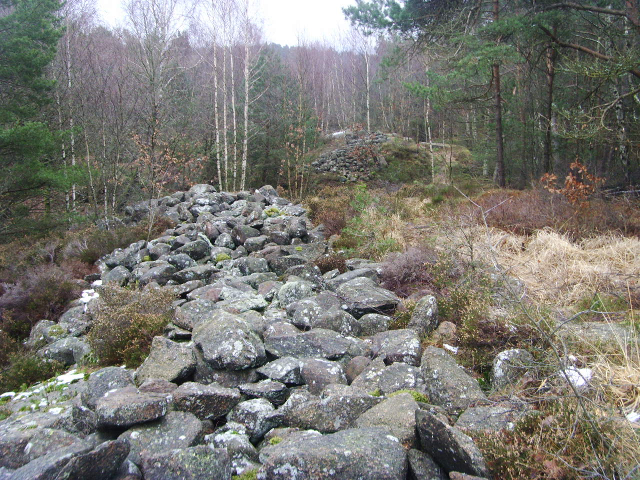 Burshälls fornborg på Hisingen har RAÄ-numret Lundby 110:1.